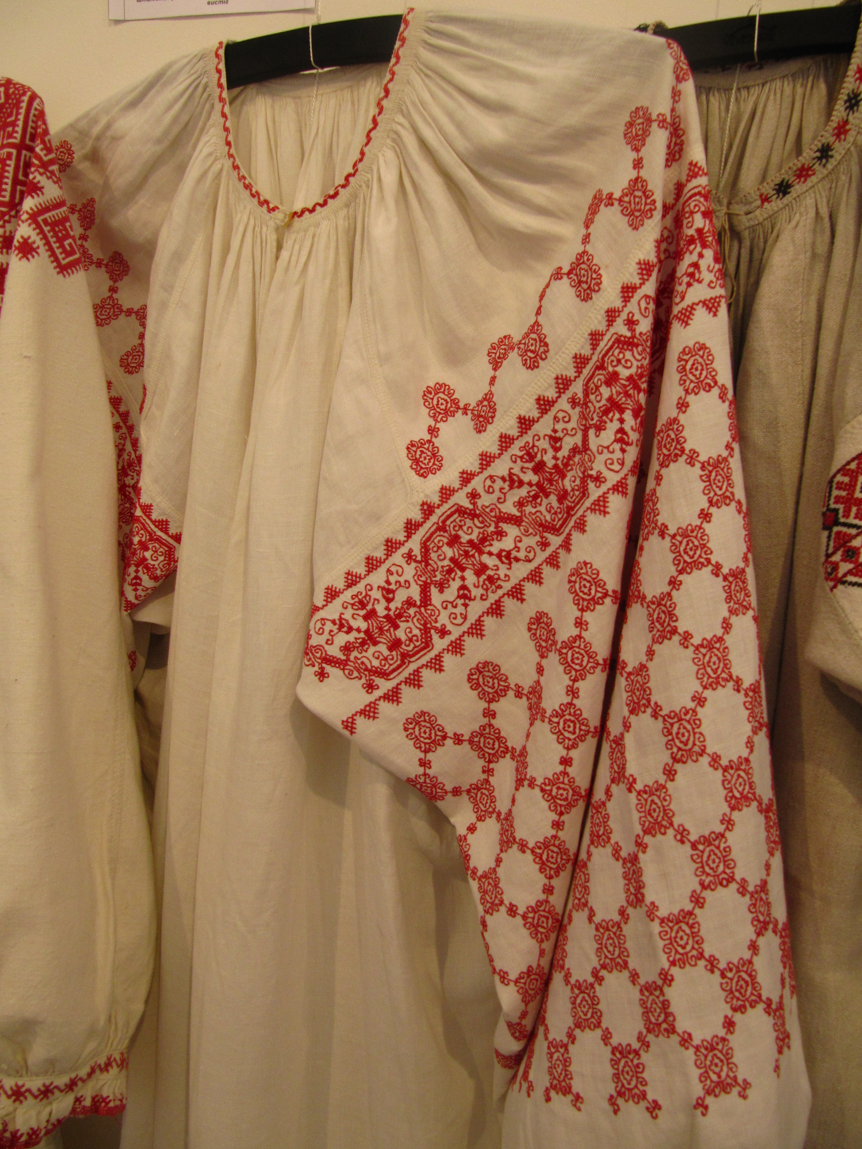 Жіноча додільна сорочка. Кінець 19 ст. Черкаська обл. Чорнобаївський р. с. Мельники. Виставка в музеї Івана Гончара (Київ).